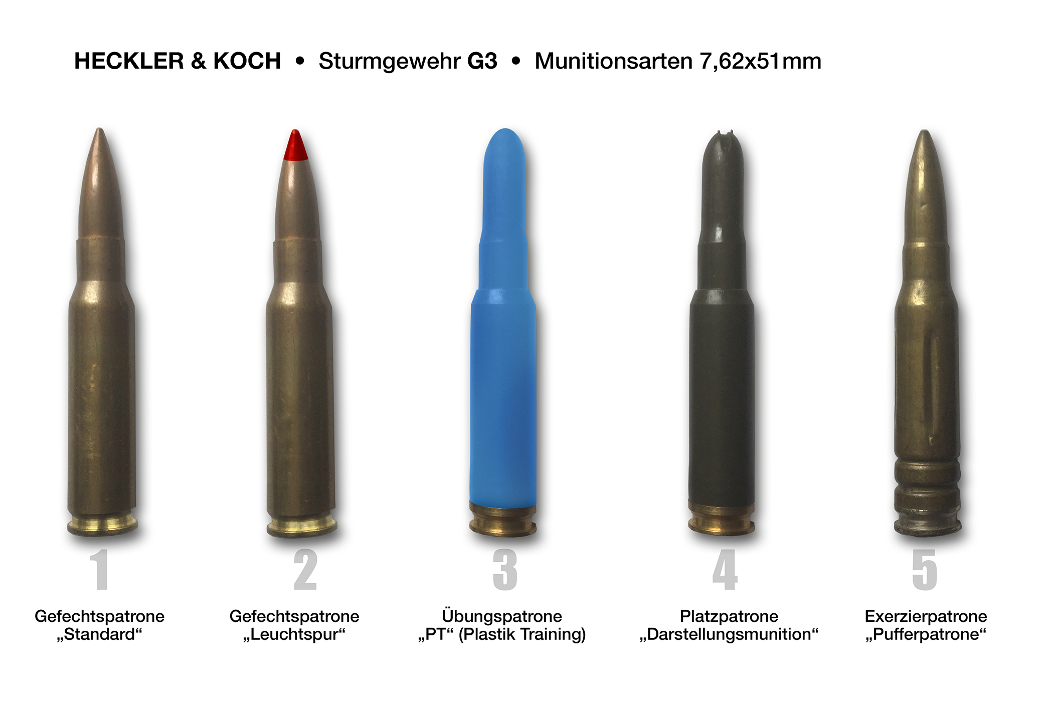 Zusammenstellung möglicher Munitionsarten bzw. Patronen für das Sturmgewehr HK G3 (Kaliber 7,62 x 51 mm)